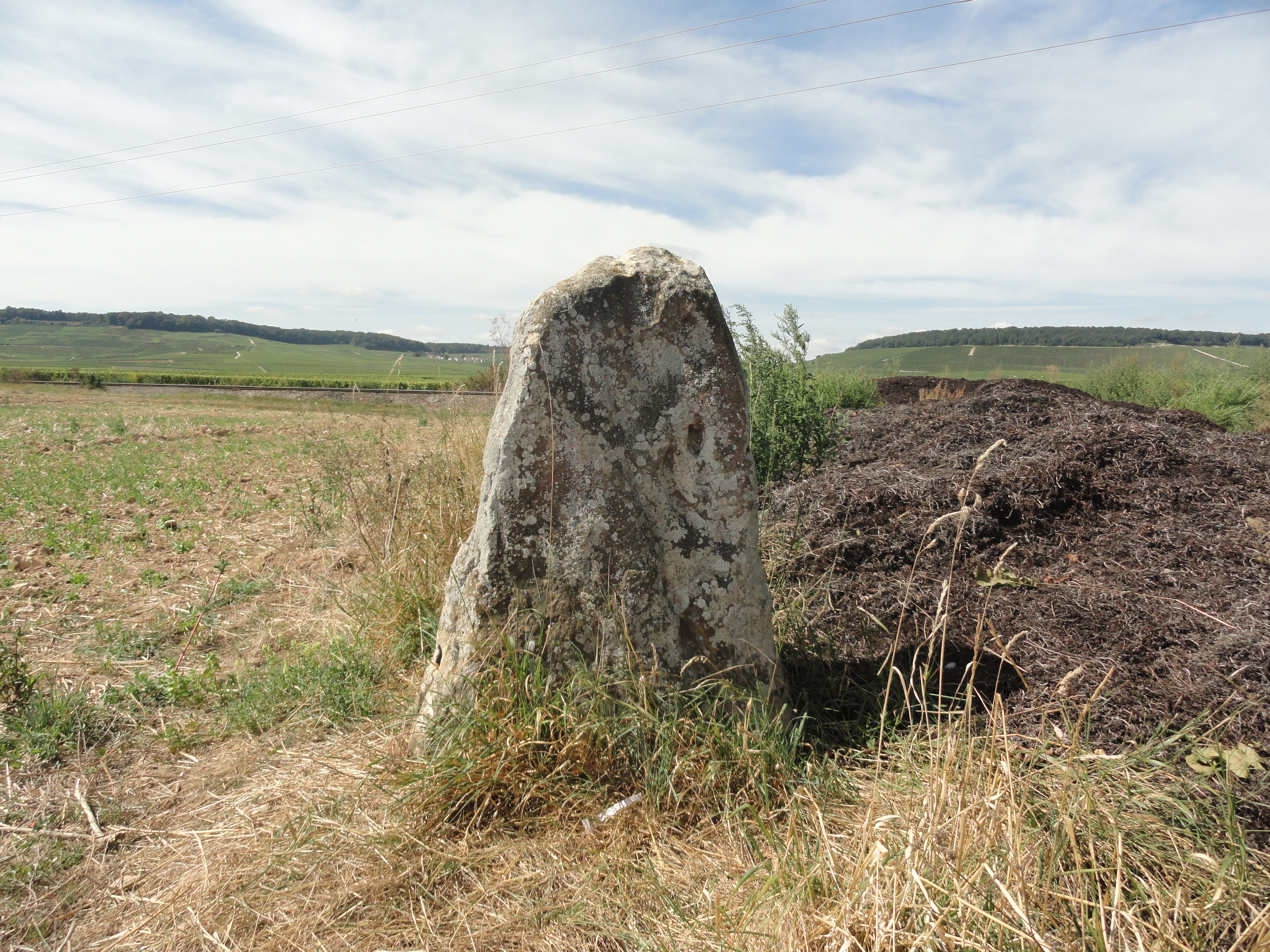 Le menhir de Haute-Borne, vu de l'est, avec en arrière plan la Côte des Blancs.